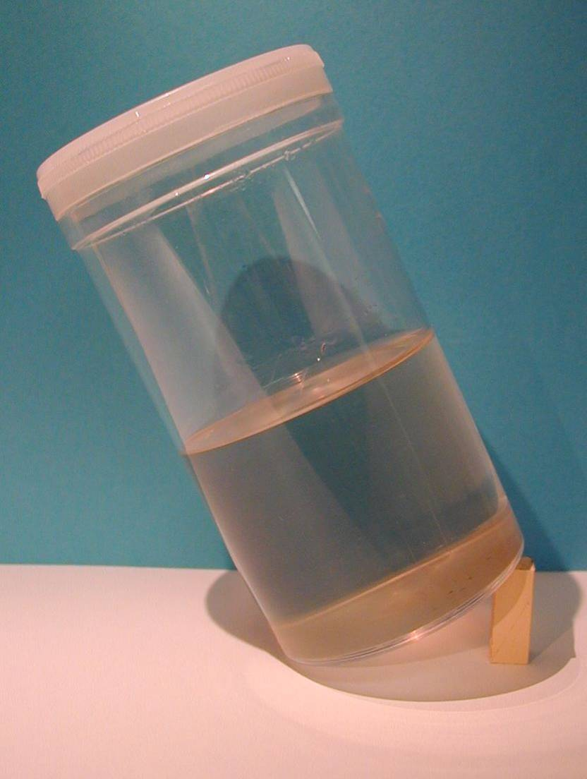 Gel de silice. Auteur : Frédéric Chaput. Licence GFDL Frédéric Chaput